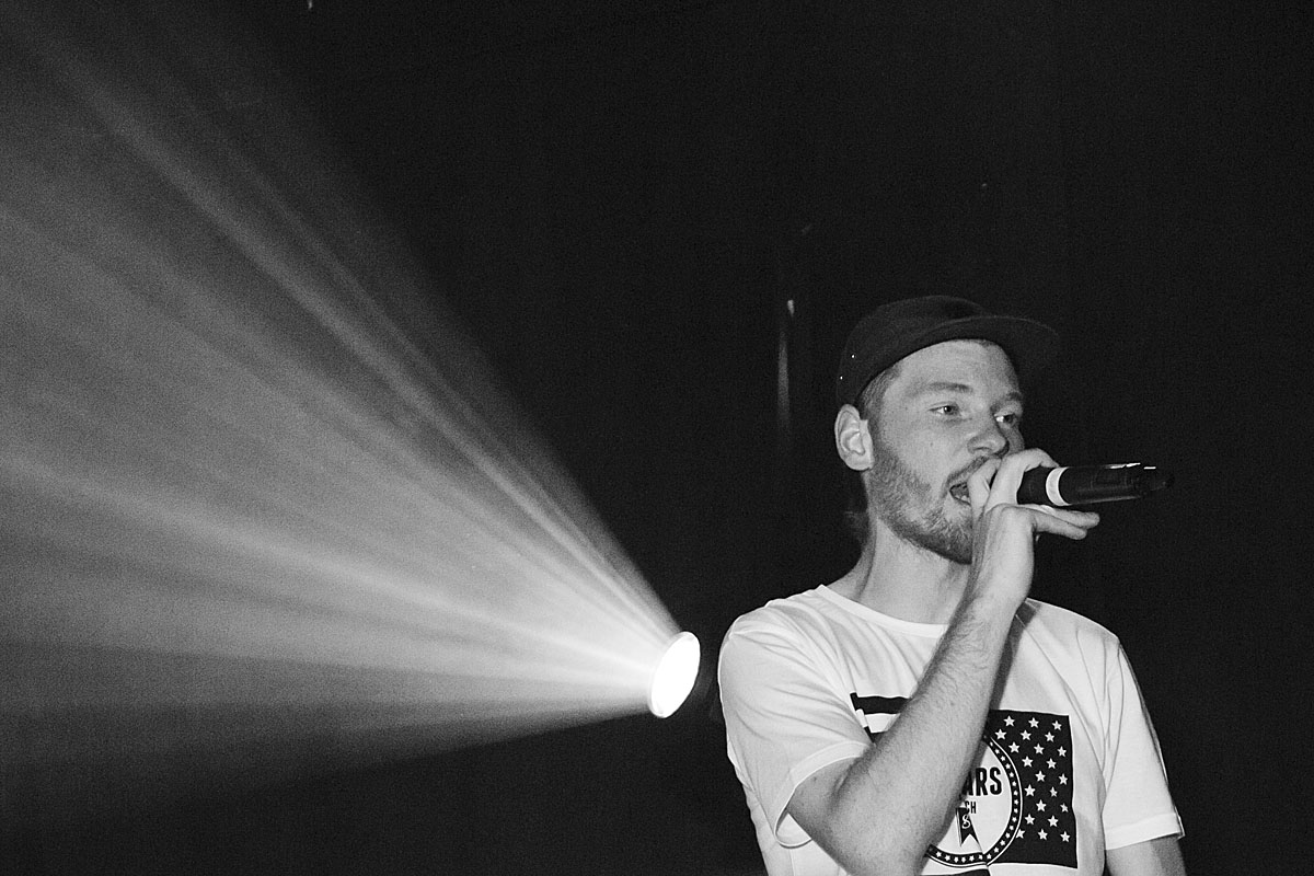 Klumben ved en koncert på spillestedet Forbrændingen 1. november 2012